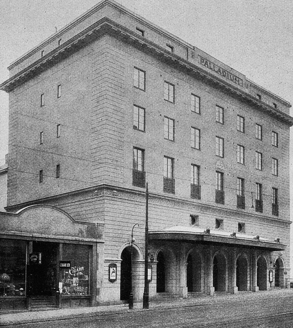 "Exteriör av Biopalatset, Kungsgatan 65"